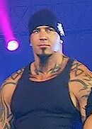 Retrato del luchador Tomko